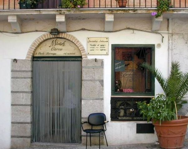 Negozio con insegne bilingue a Piana degli Albanesi